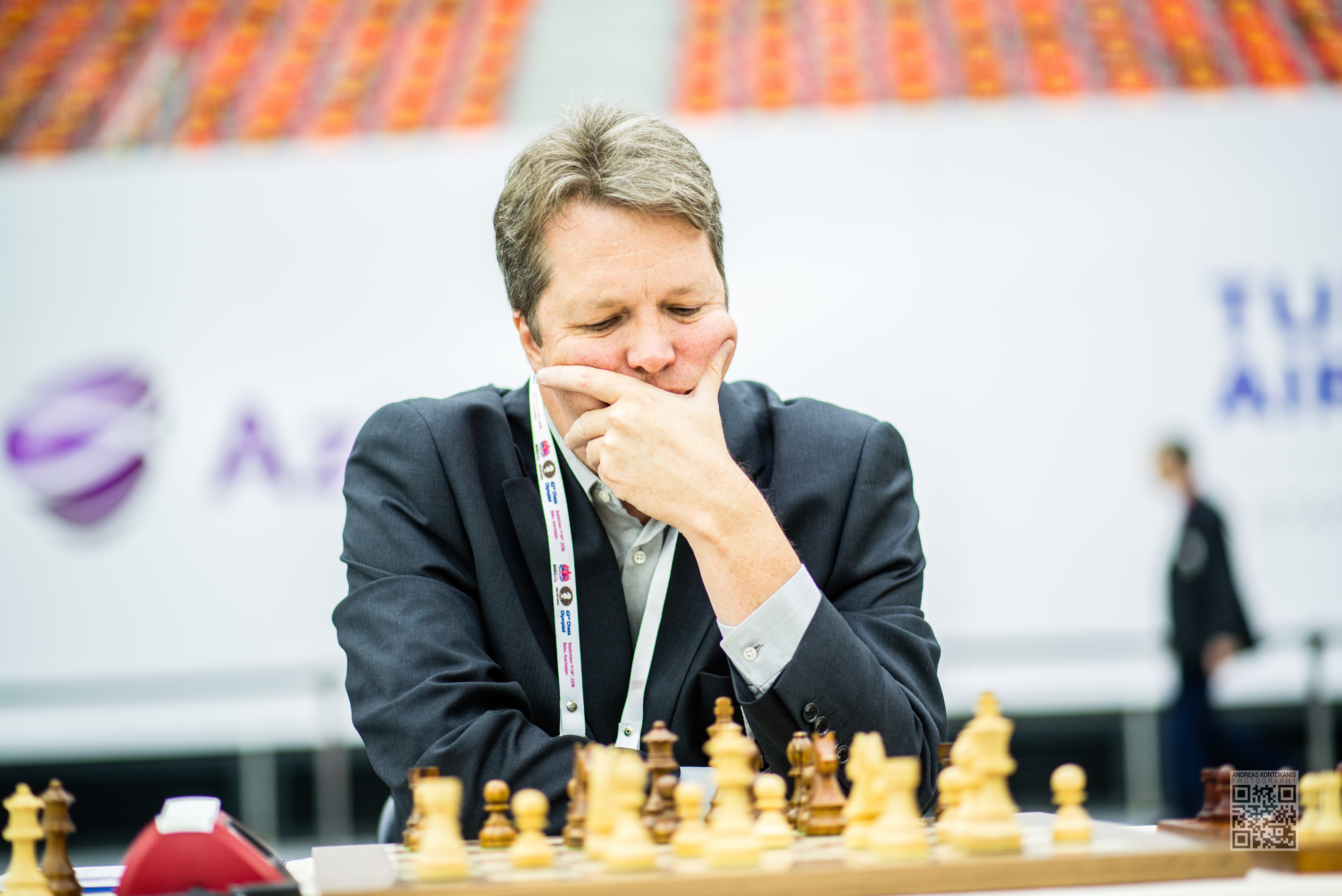 Short Nigel